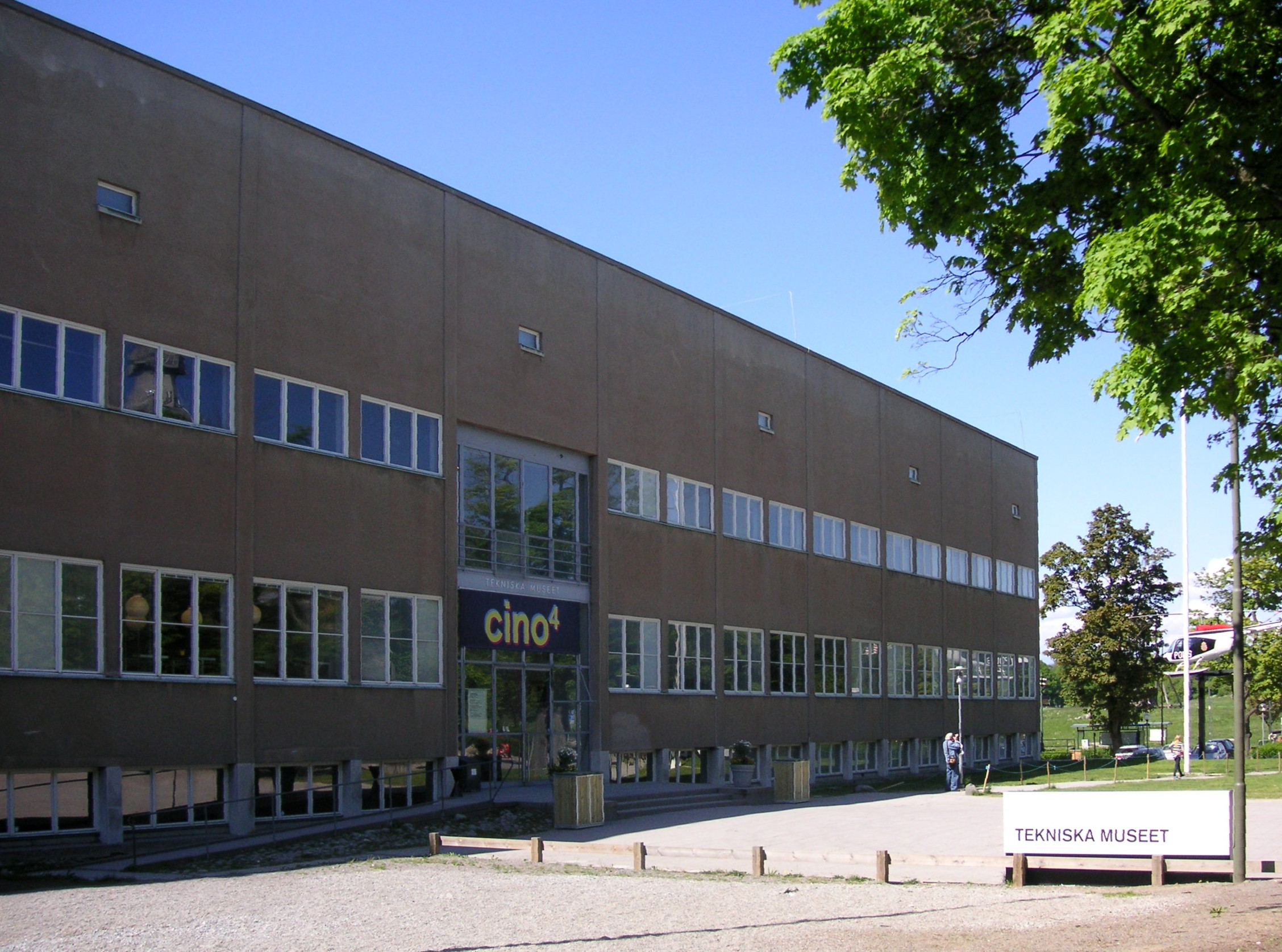 Tekniska museet i Stockholm